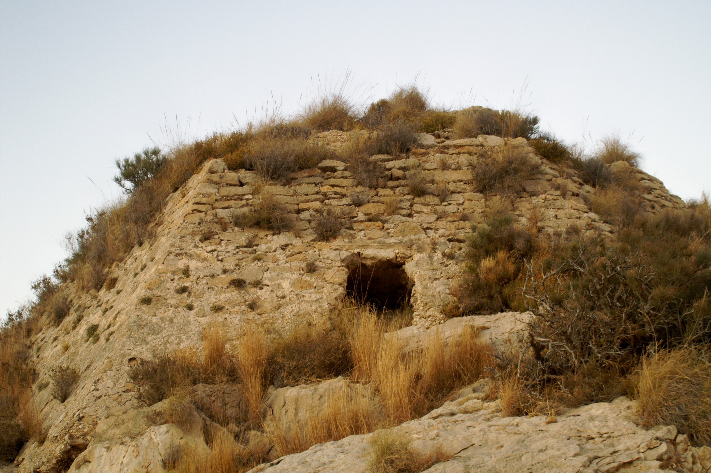 Vista general de la torre. Se puede observar el acceso.